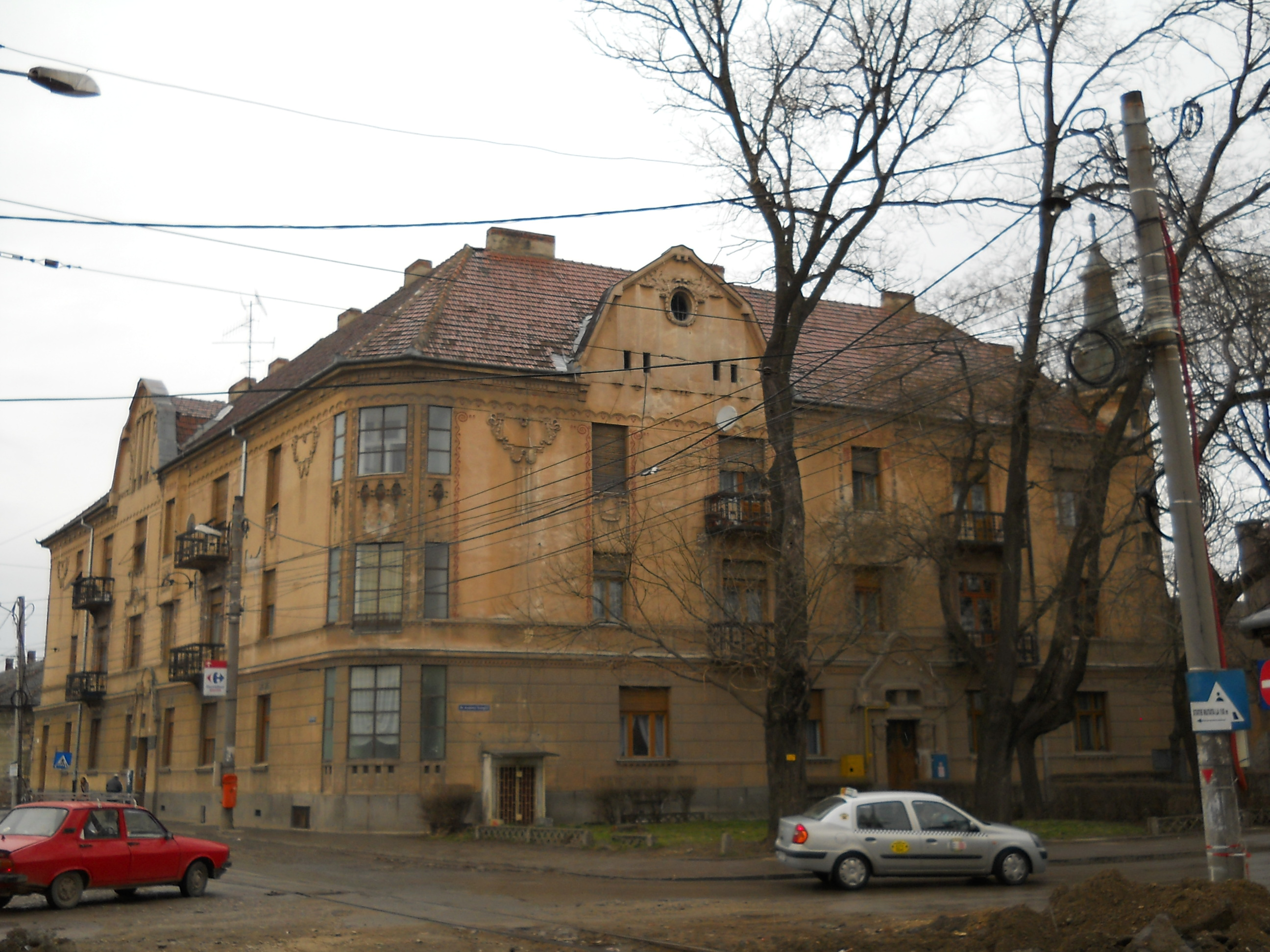 Vedere de ansamblu